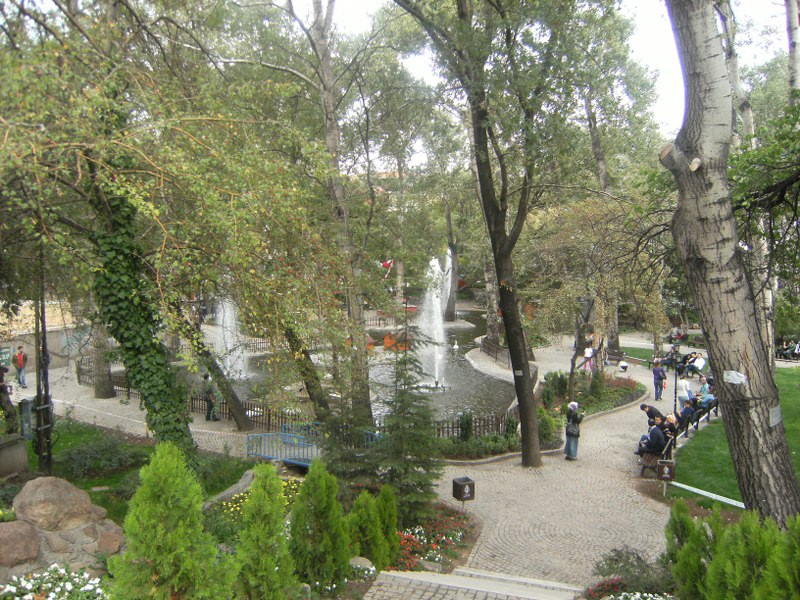 Kuğulu Park'tan görünüm